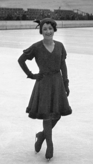 Palais des Sports : Championnats d'Europe : Melle Vandecrane : [photographie de presse] / Agence Meurisse